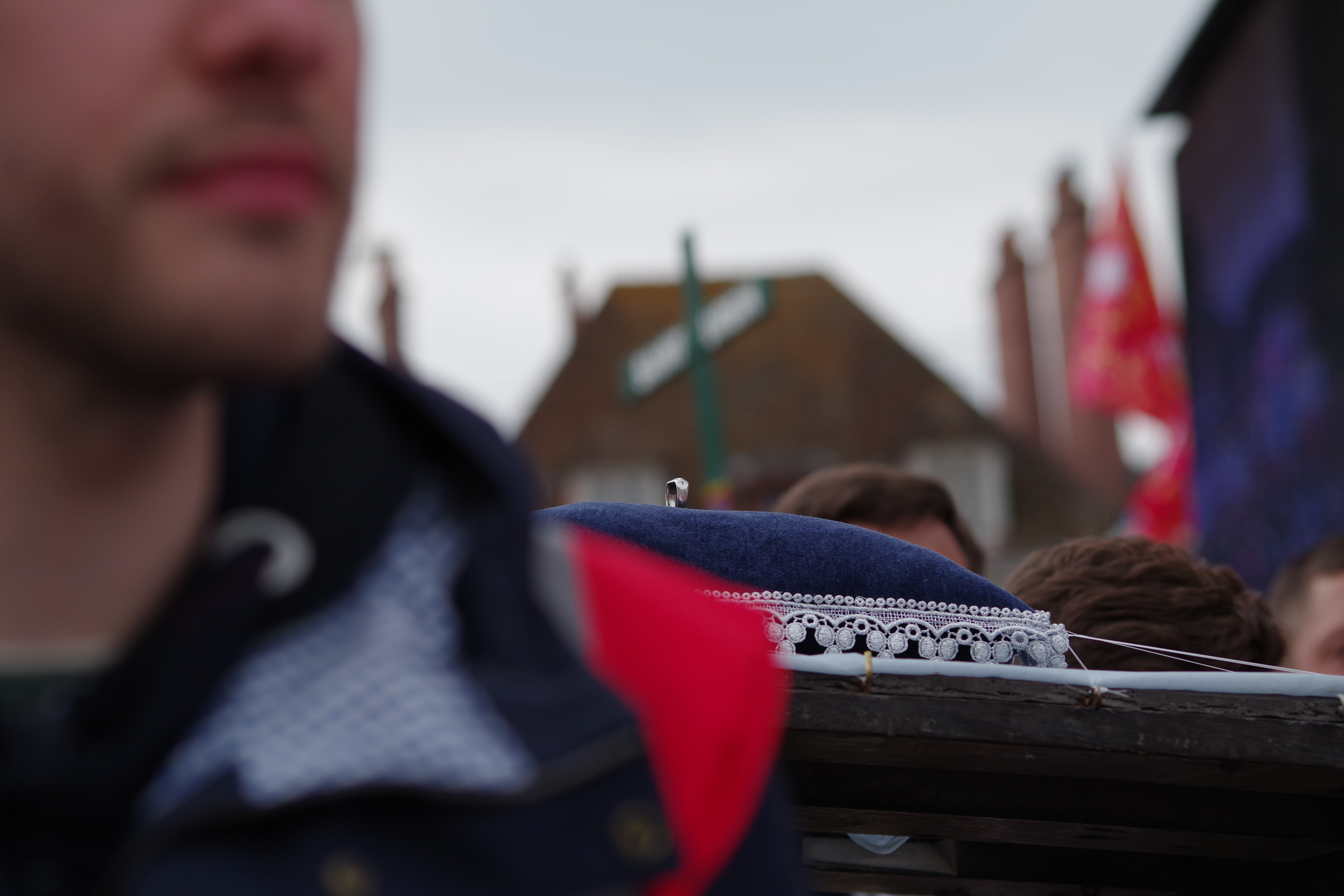 Anneau attribué à Jeanne d'Arc, porté en procession lors du pèlerinage de Pentecôte organisé par l'association Notre-Dame de Chrétienté, 2016.